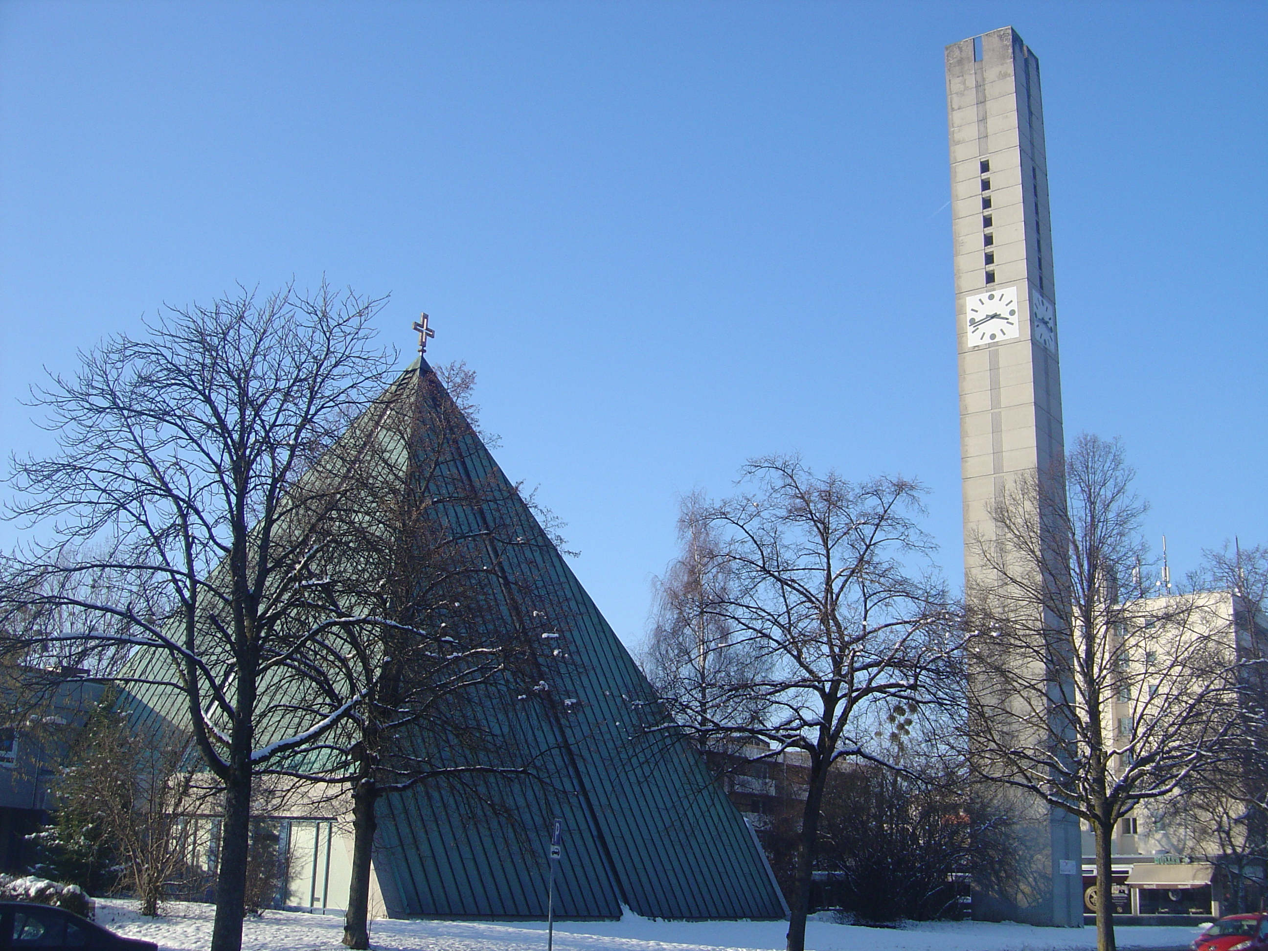 Kapernaumkirche München von der Lassallestr. aus gesehen